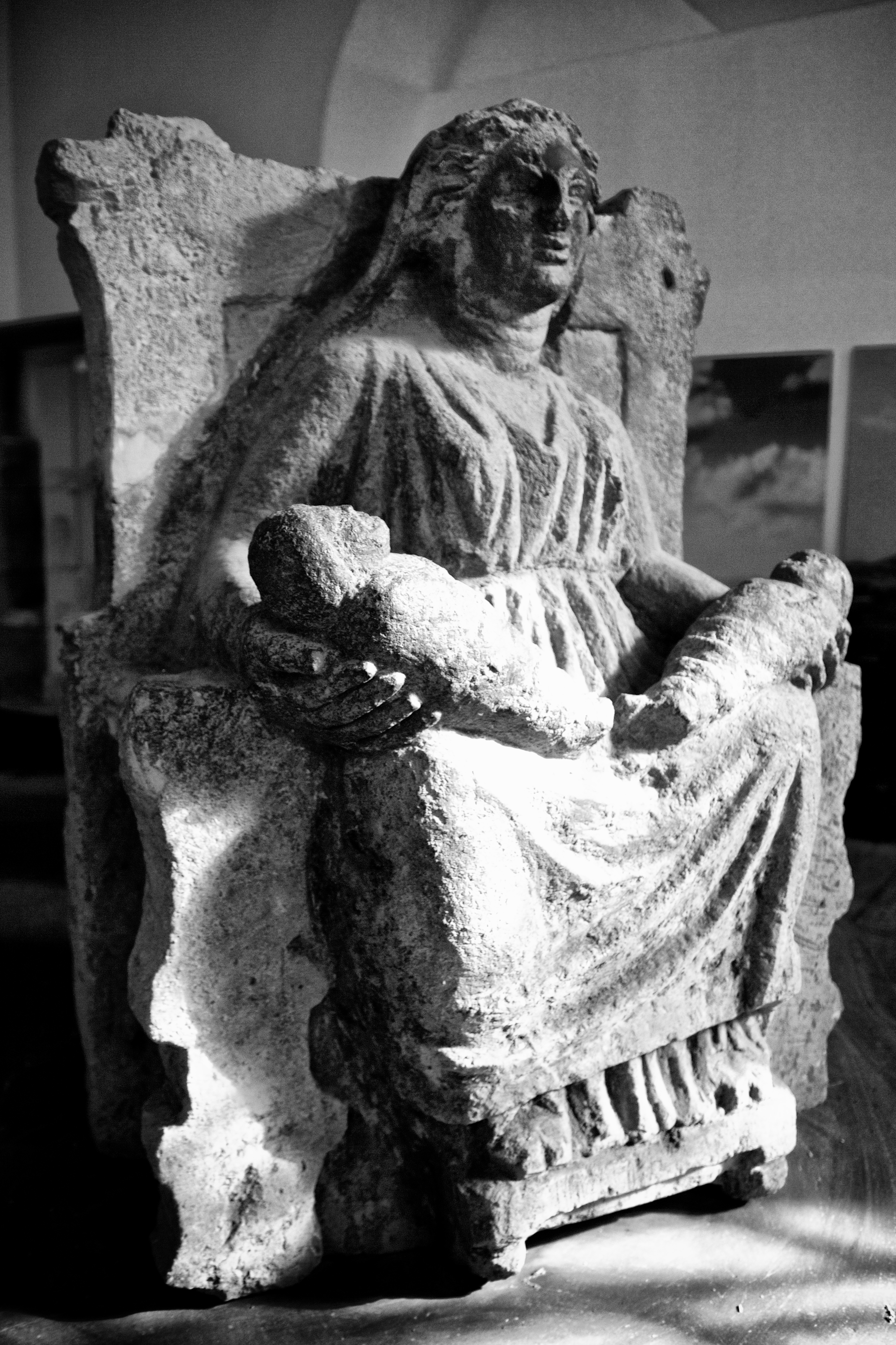 Museo Archeologico dell'Antica Capua This is a photo of a monument which is part of cultural heritage of Italy.